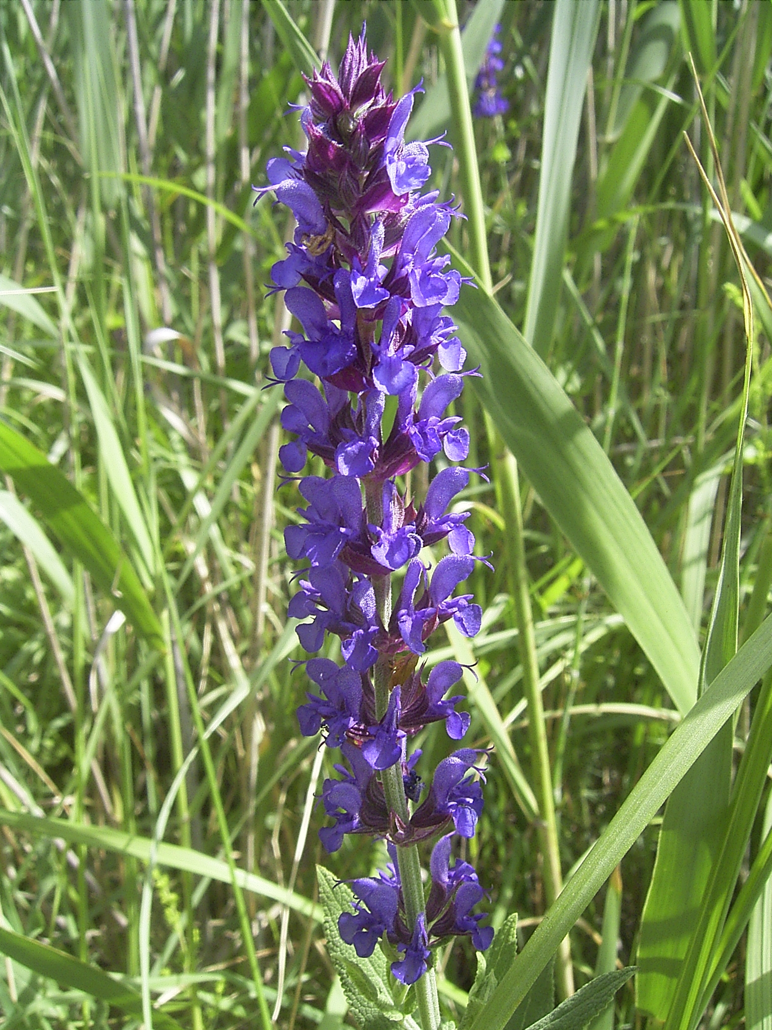 Salvia nemorosa flora. Ostufer des Neusiedler Sees, „Hölle“, Österreich, Juni 2006.